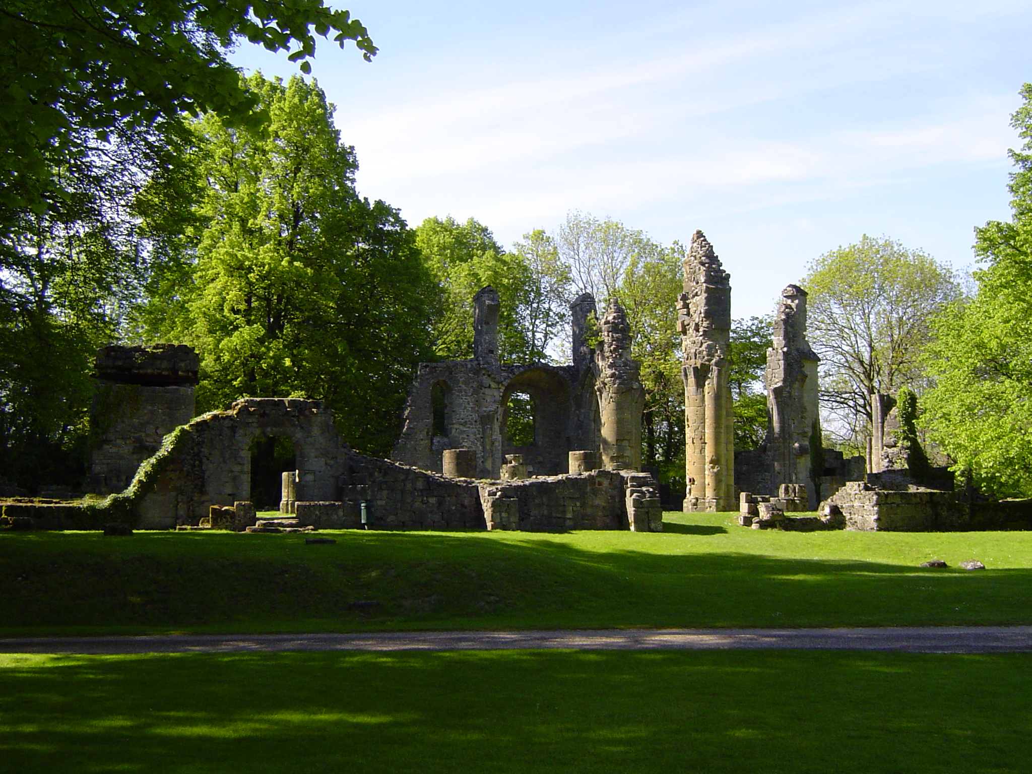 Vernietigde klooster van Montfaucon